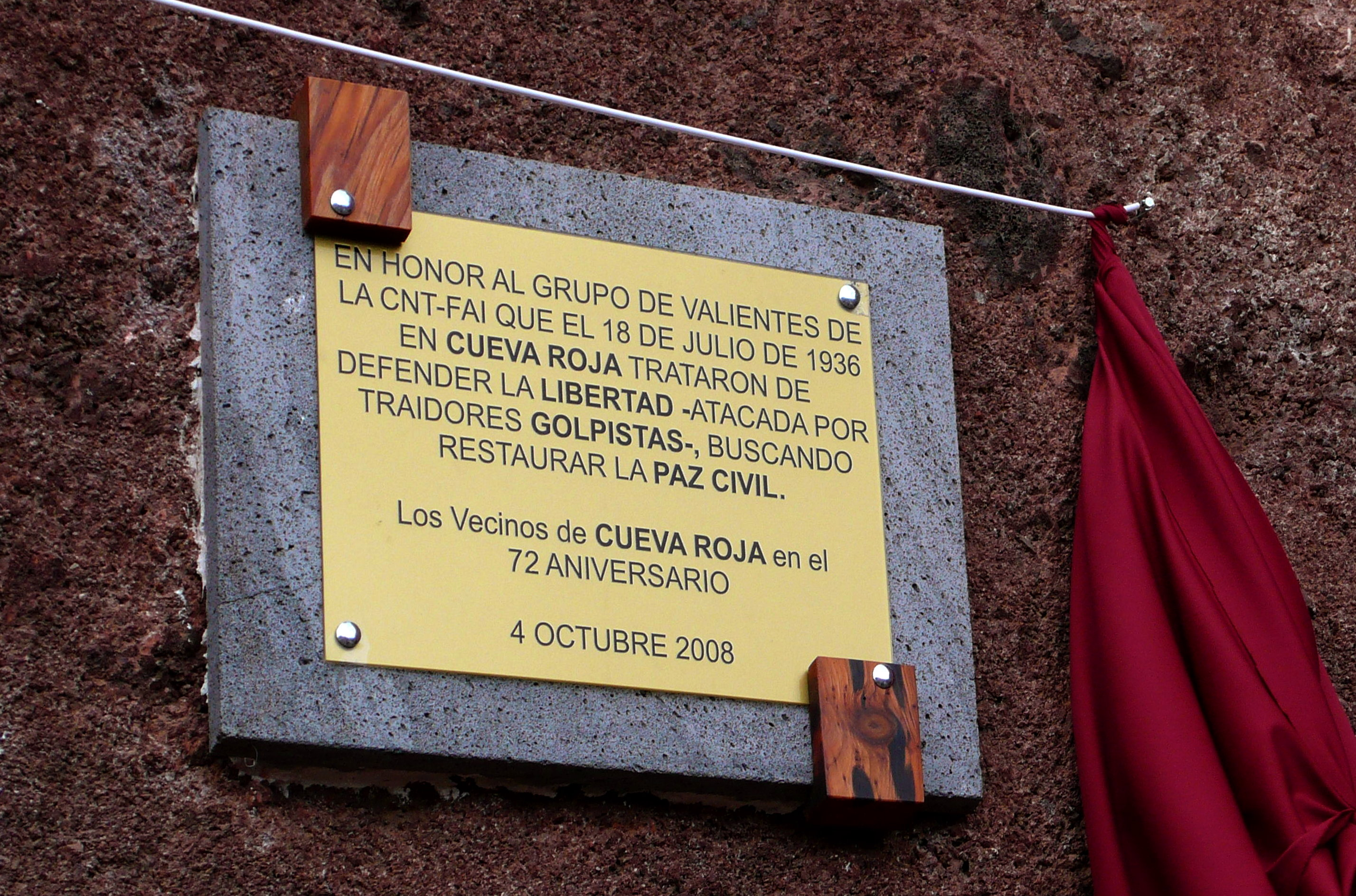 Placa en recuerdo de los 19 miembros de la CNT-FAI fusilados en Cueva Roja.